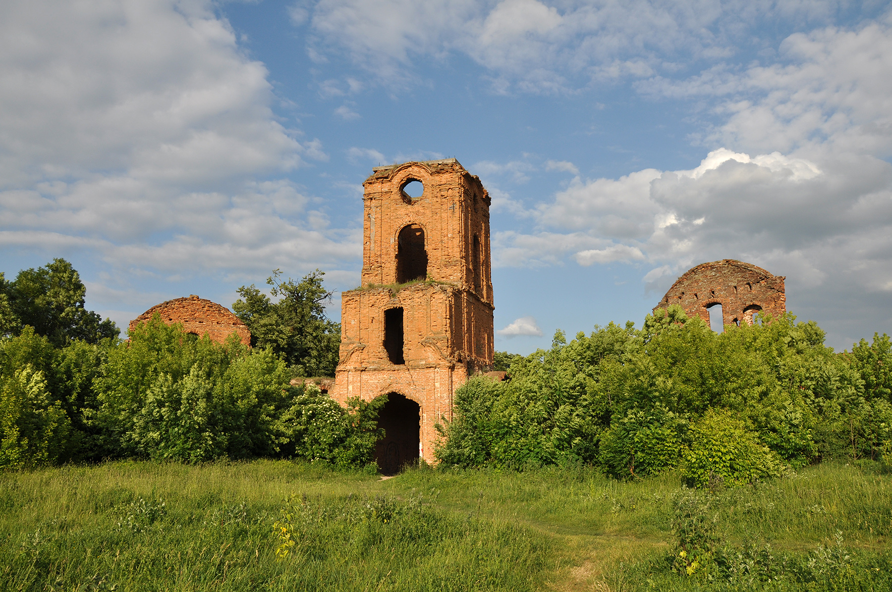 Замок (мур.), Корець, вул.Б.Хмельницького